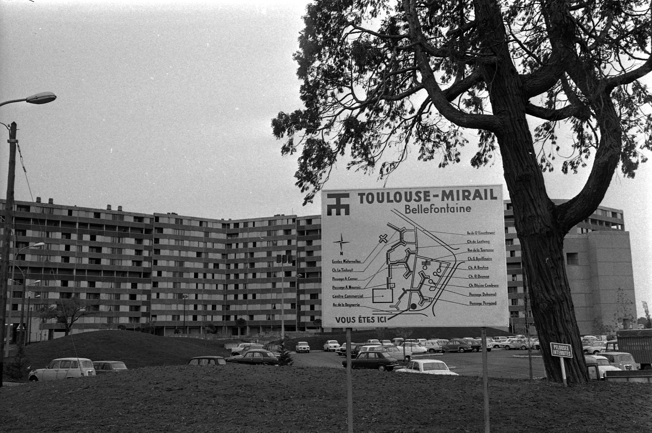 Toulouse Le Mirail, quartier de Bellefontaine, immeubles Pergaud, chemin de Lestang, passage Louis-Pergaud. 13 novembre 1970. Vue des immeubles Pergaud dans le quartier du Mirail-Bellefontaine ; panneau avec plan de situation du quartier.